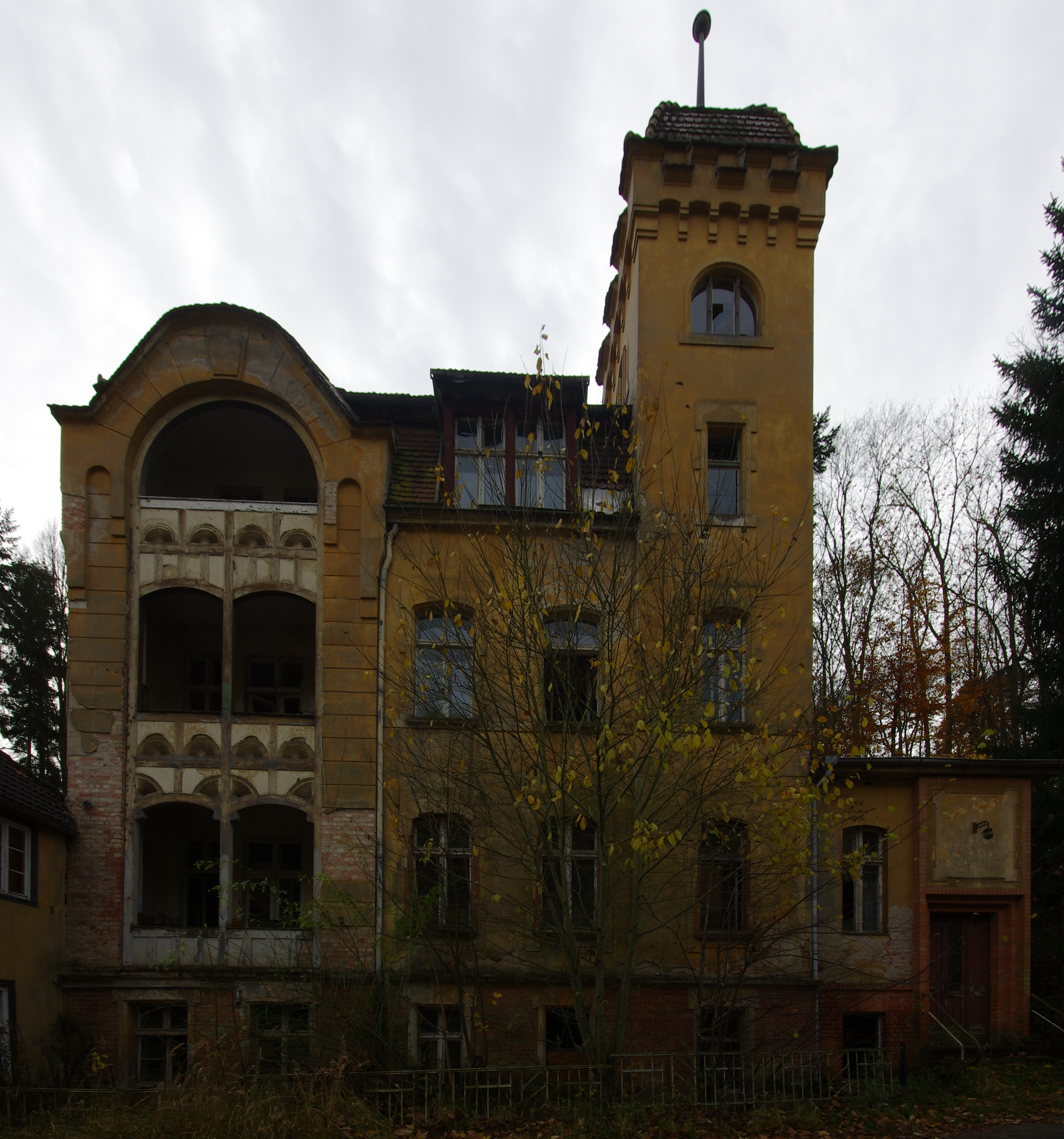 Bad Freienwalde (Oder). Das Haus in der Straße Heilige Hallen 3 steht unter Denkmalschutz.